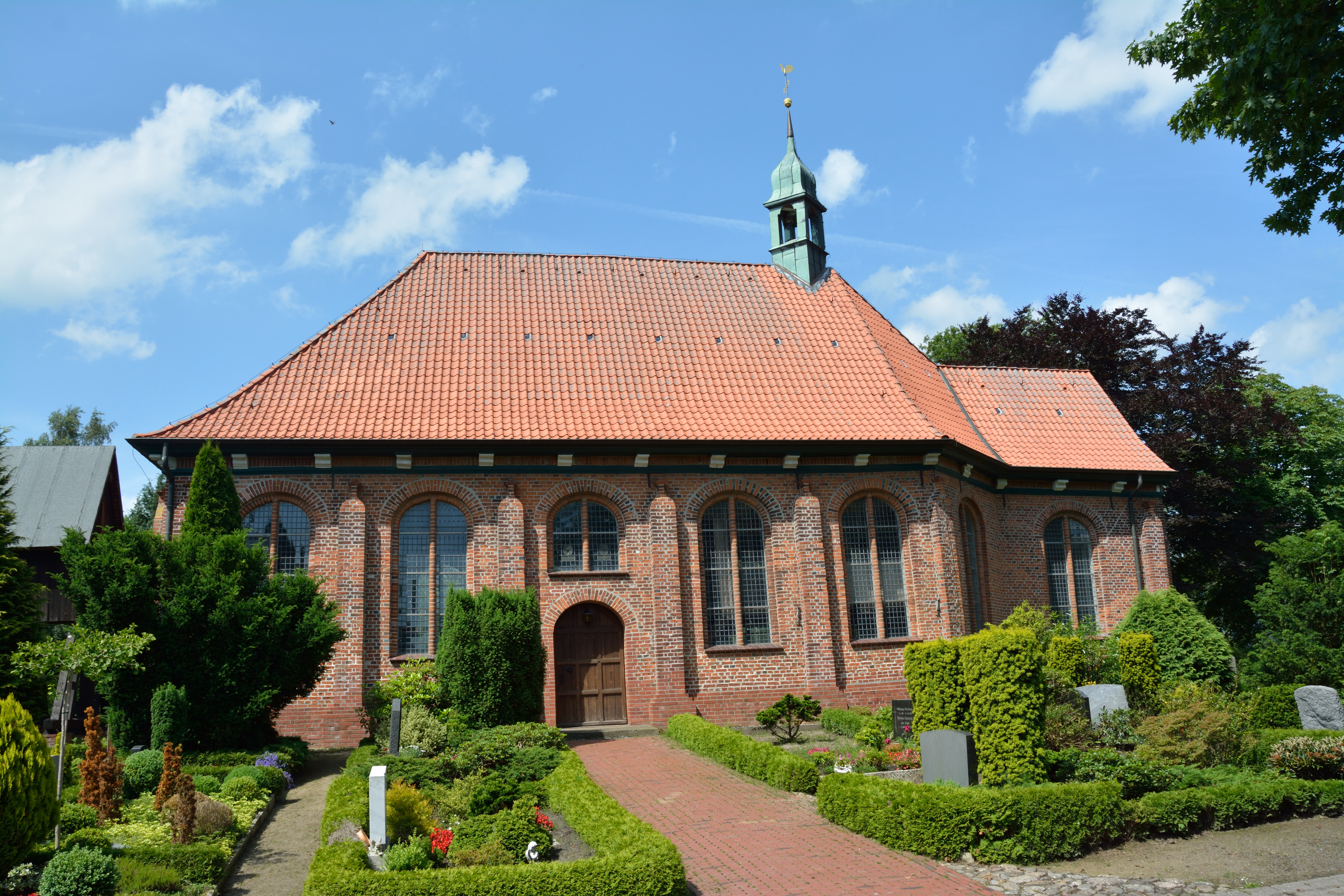 St.-Georg-Kirche (Krummendiek)